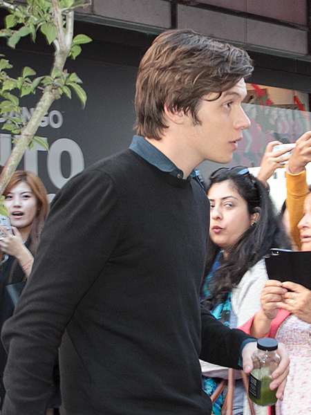 Toronto International Film Festival 2015